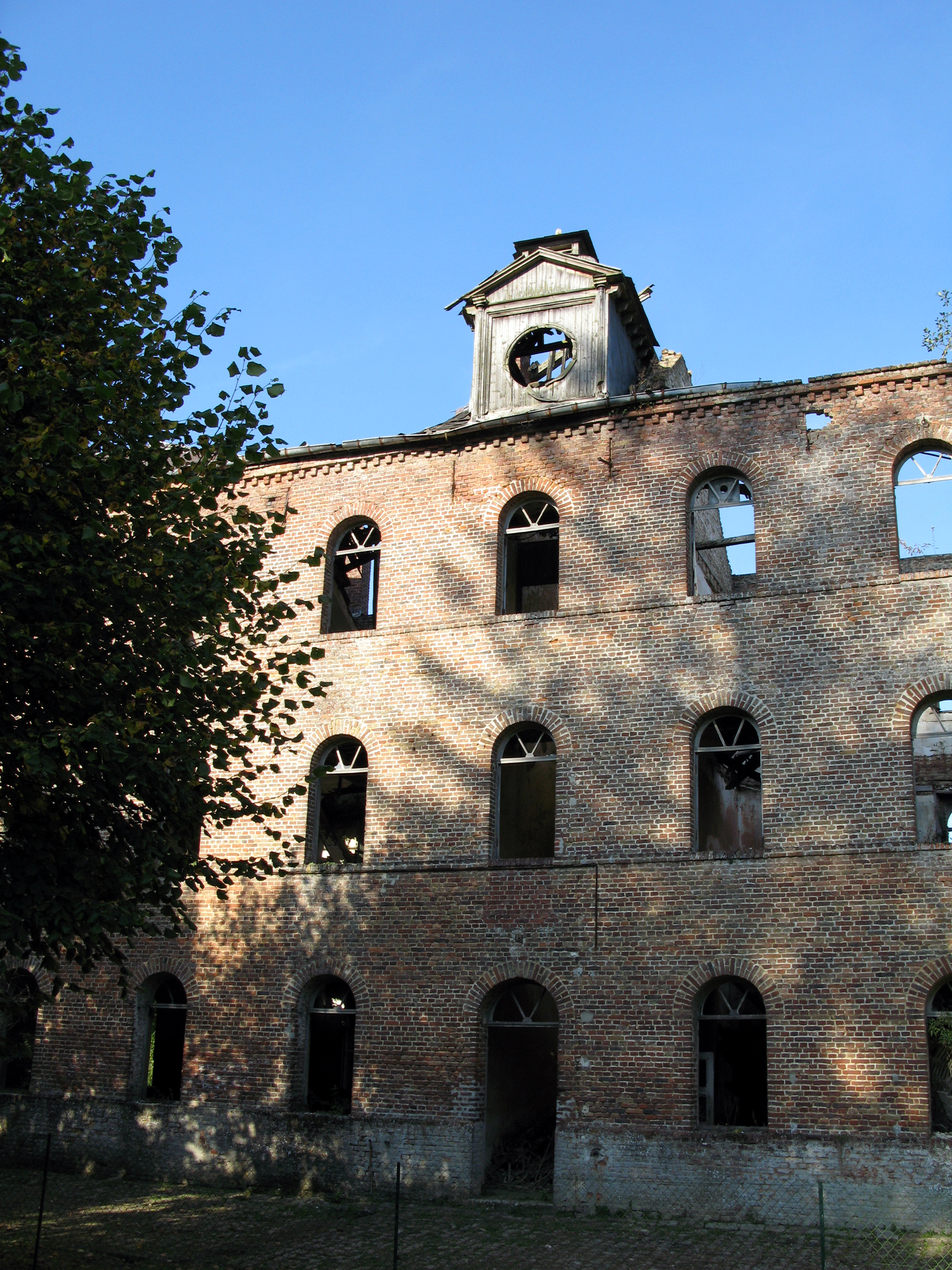 Doullens (Somme, France) - Intérieur de la citadelle. . . .